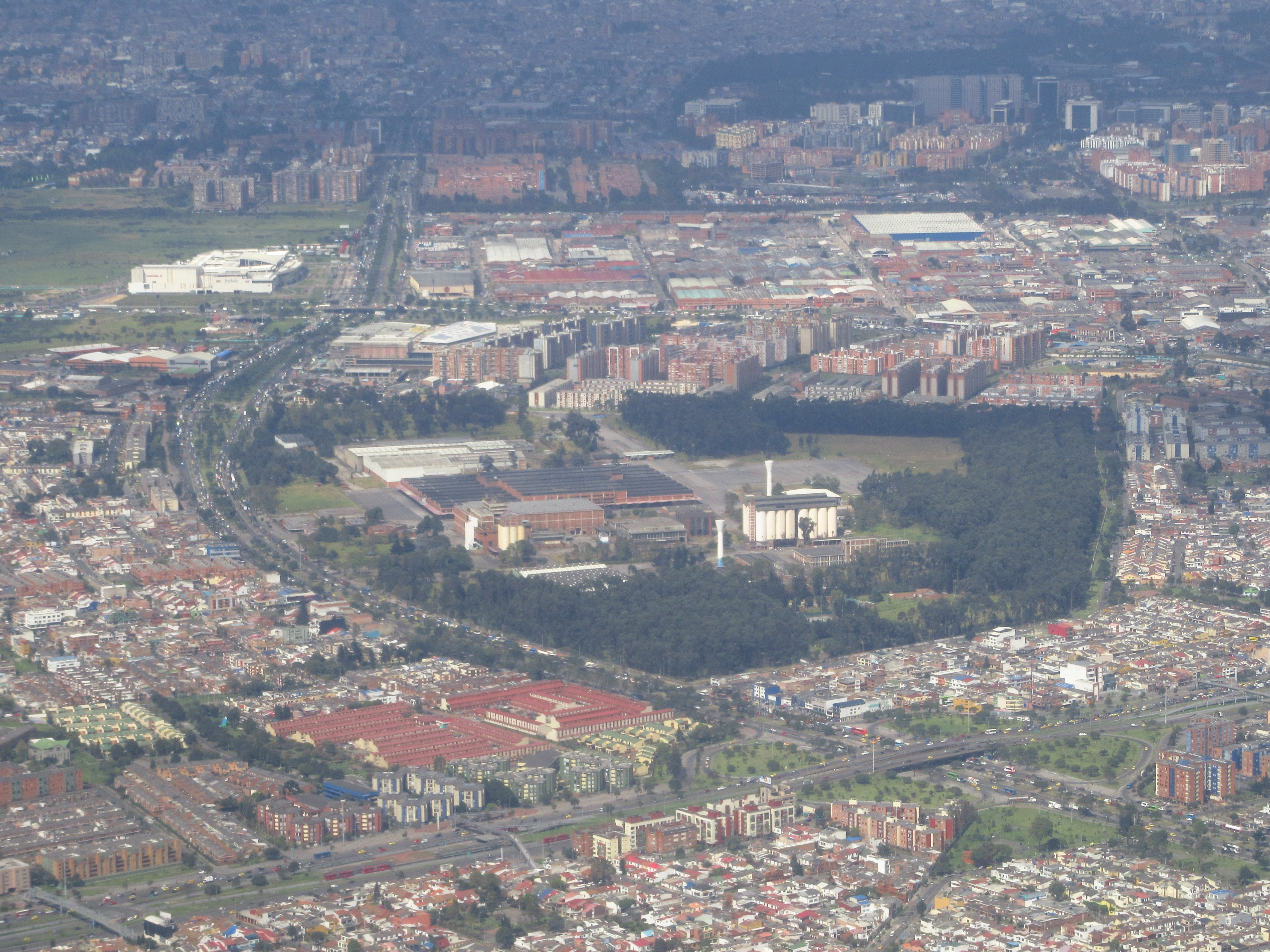 Vista aérea de la antigua fábrica de Bavaria, al occidente de Bogotá, bordeando la avenida Boyacá. Abajo a la derecha, la avenida de Las Américas.